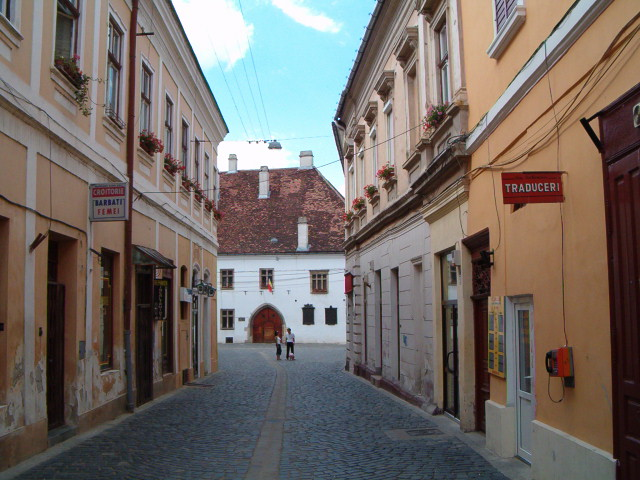 Cluj-Napoca, Casa lui Matei Corvin, str. Matei Corvin nr.6